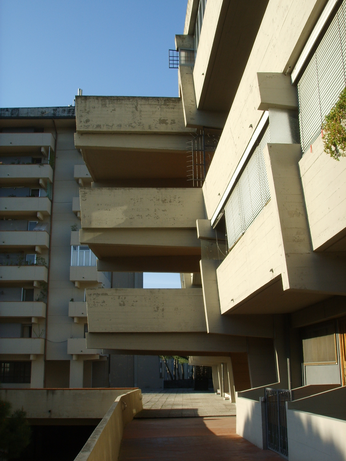 Edificio la Nave di Sorgane